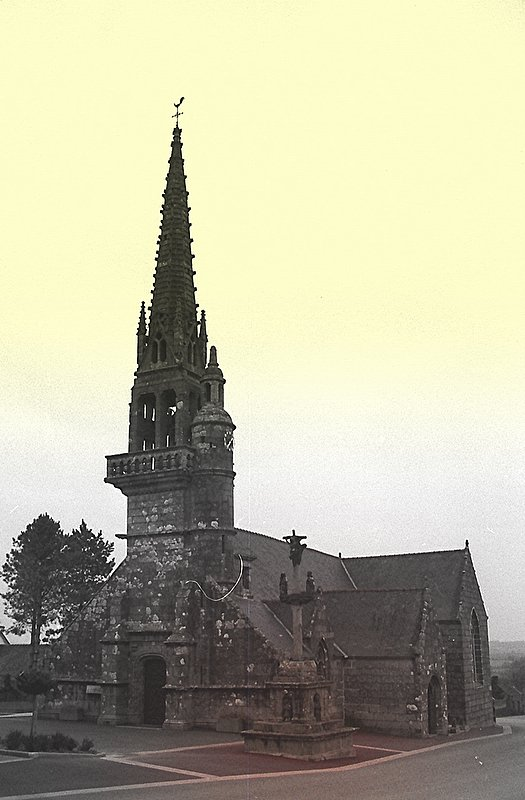 Eglise Saint Blaise du Cloître Pleyben, denez goasguen